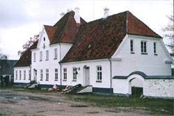 Lyngballegaard, Lading Sogn, Favrskov Kommune, Denmark